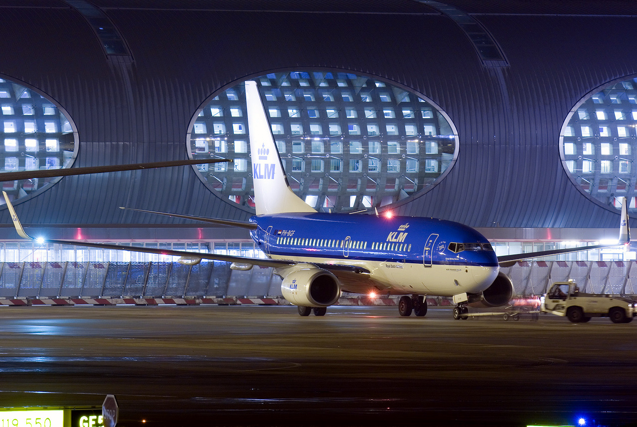 Repoussage d'un Boeing 737 de la companie KLM